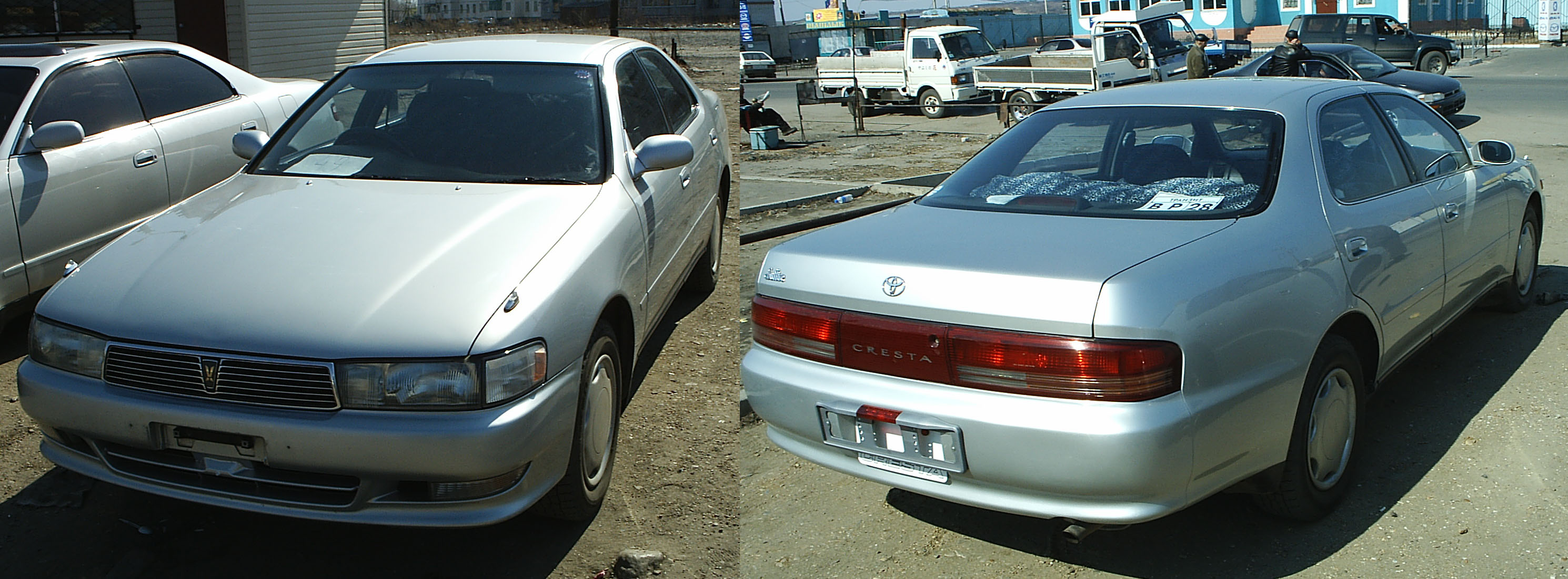 Toyota Cresta 1993 г.в.